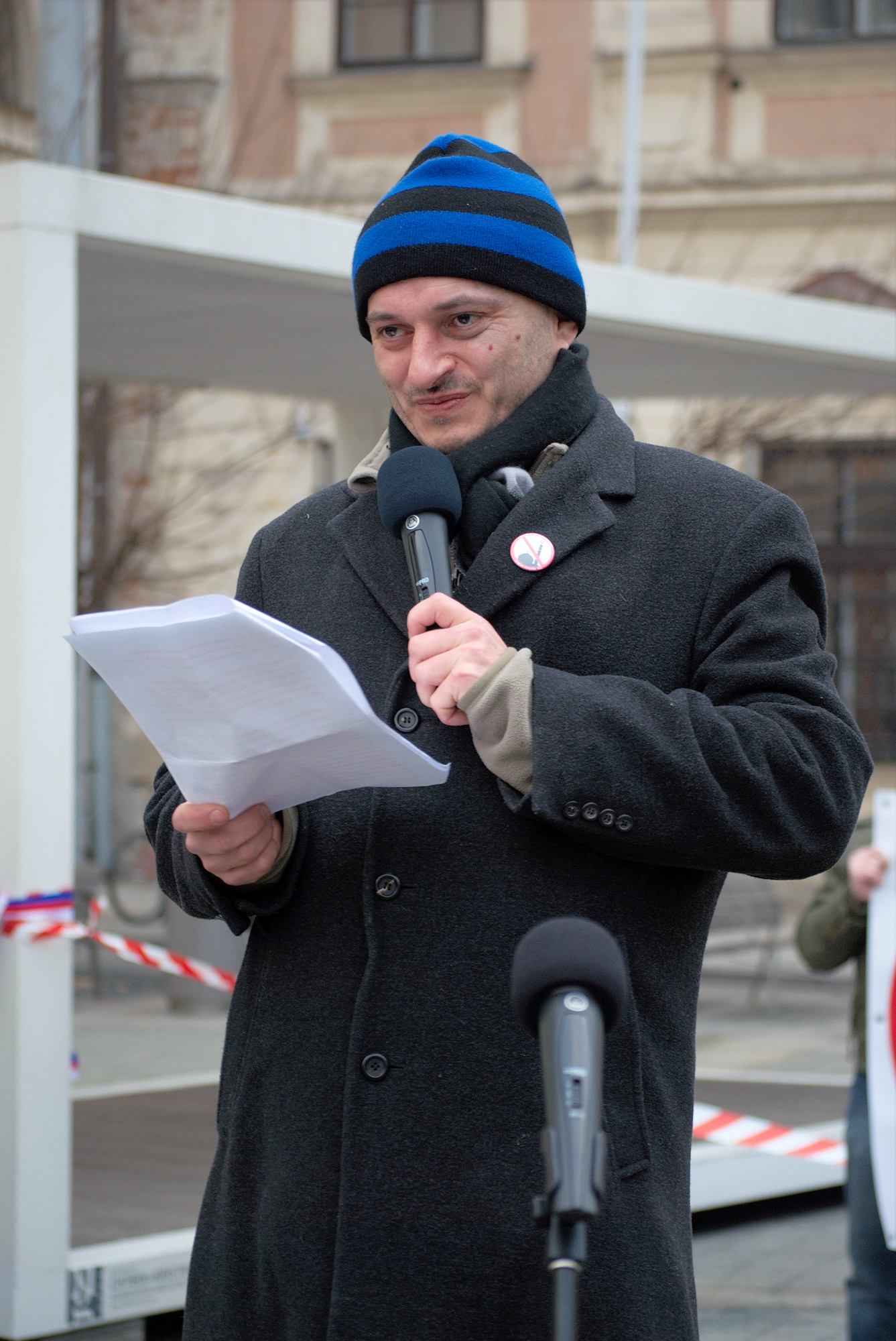 Doc. Mgr. Martin Konvička Ph.D. na demonstraci v Brně 14. února 2015